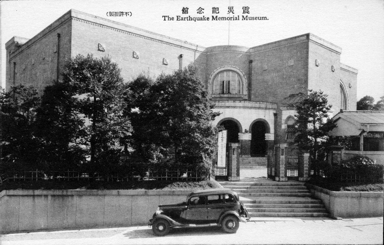 ポストカード「横浜市図書館 新築落成記念」3枚入のうちの1枚。